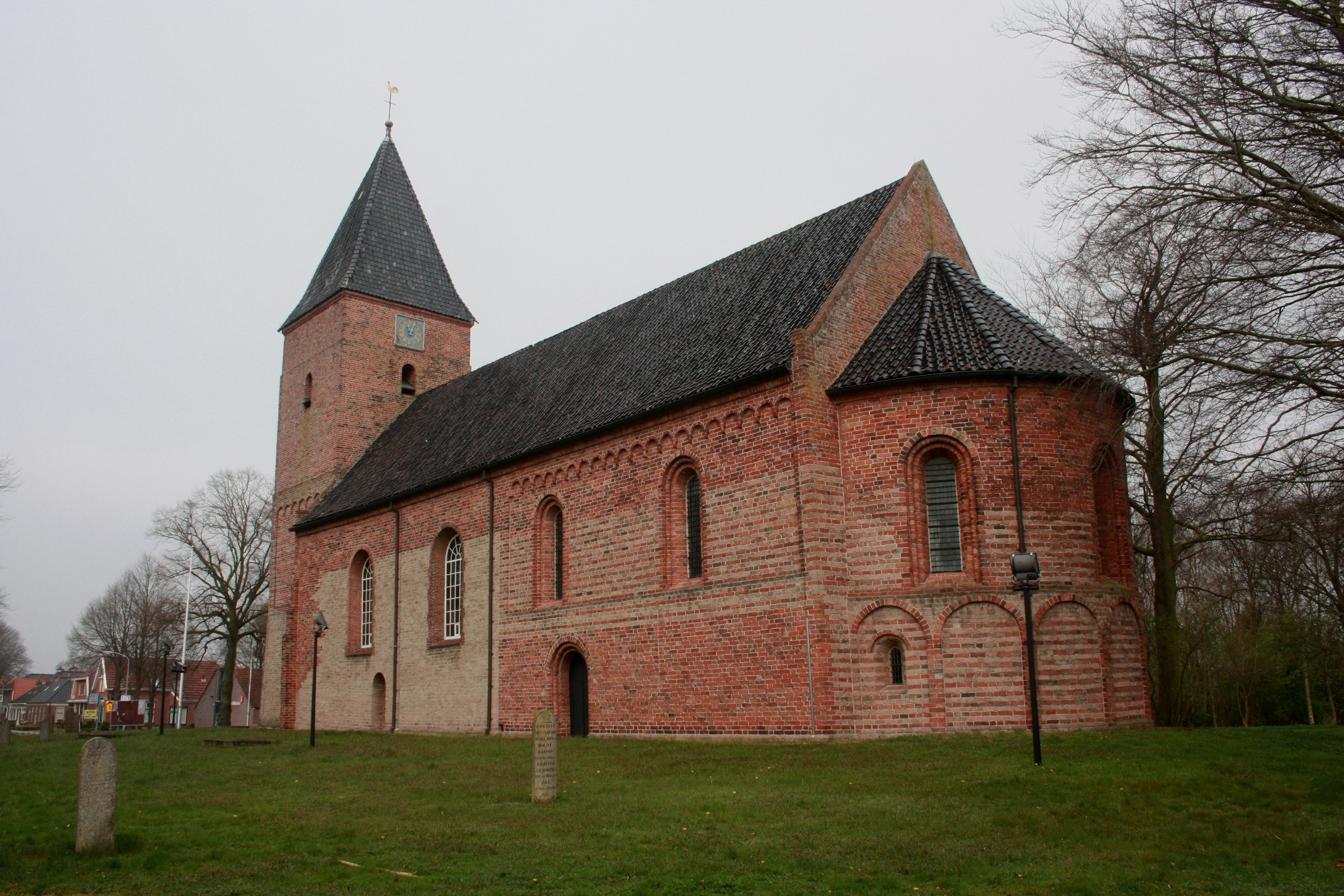 Siddeburen, Hervormde kerk